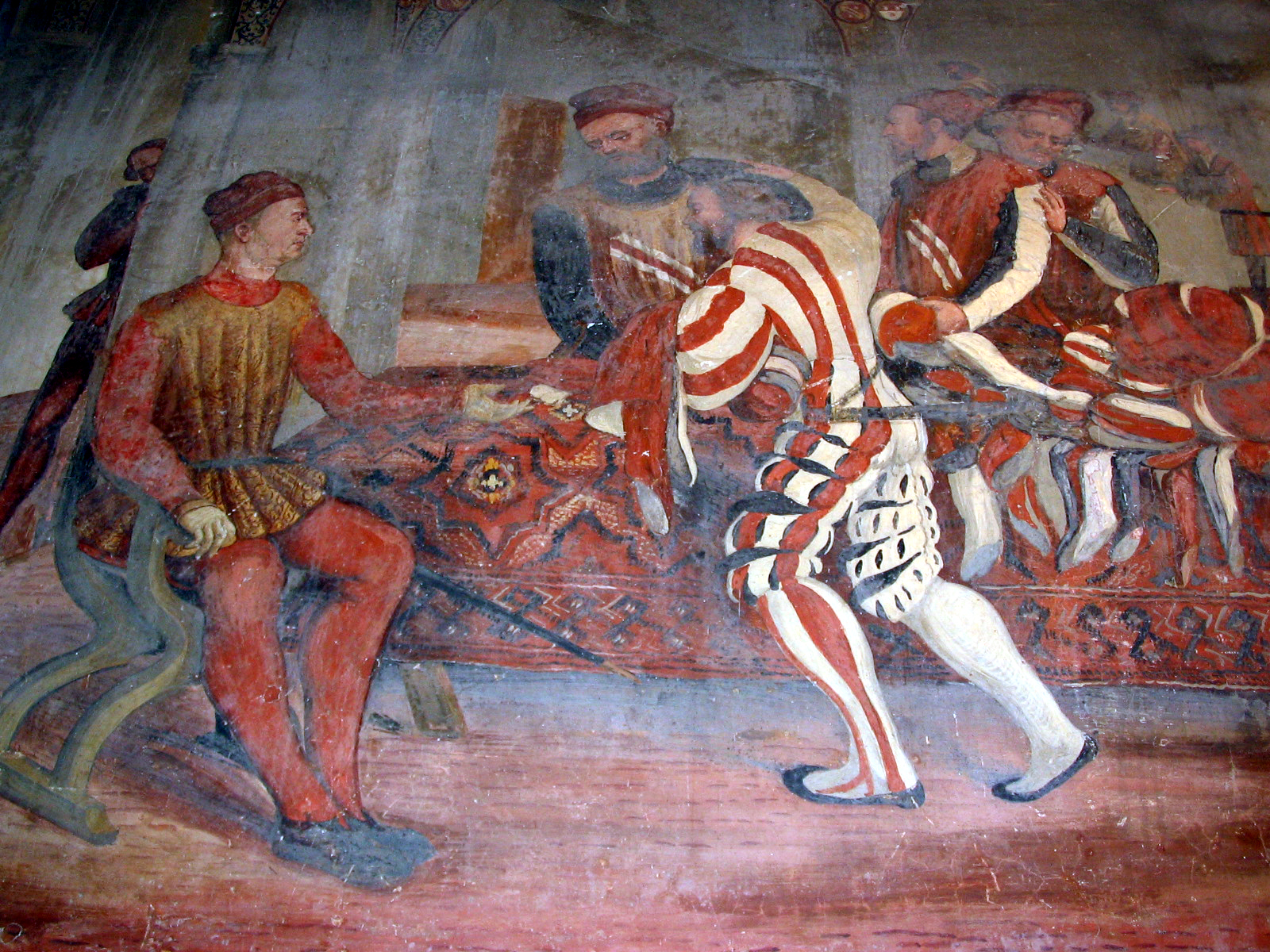 Il Romanino (attribuito a), Bartolomeo Colleoni concede udienza (1467). Dettaglio. Affresco dal Castello di Malpaga, già di Bartolomeo Colleoni. Foto di Giorces.